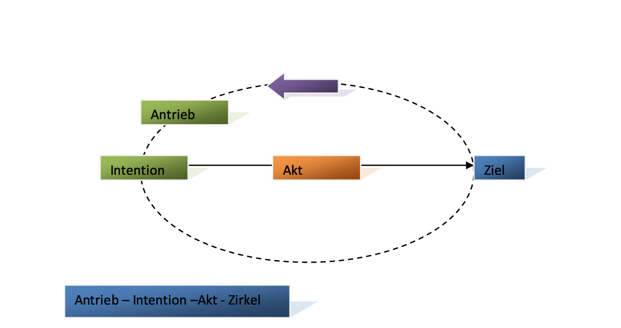 Intention - Akt- Ziel erklärung bei Sartre